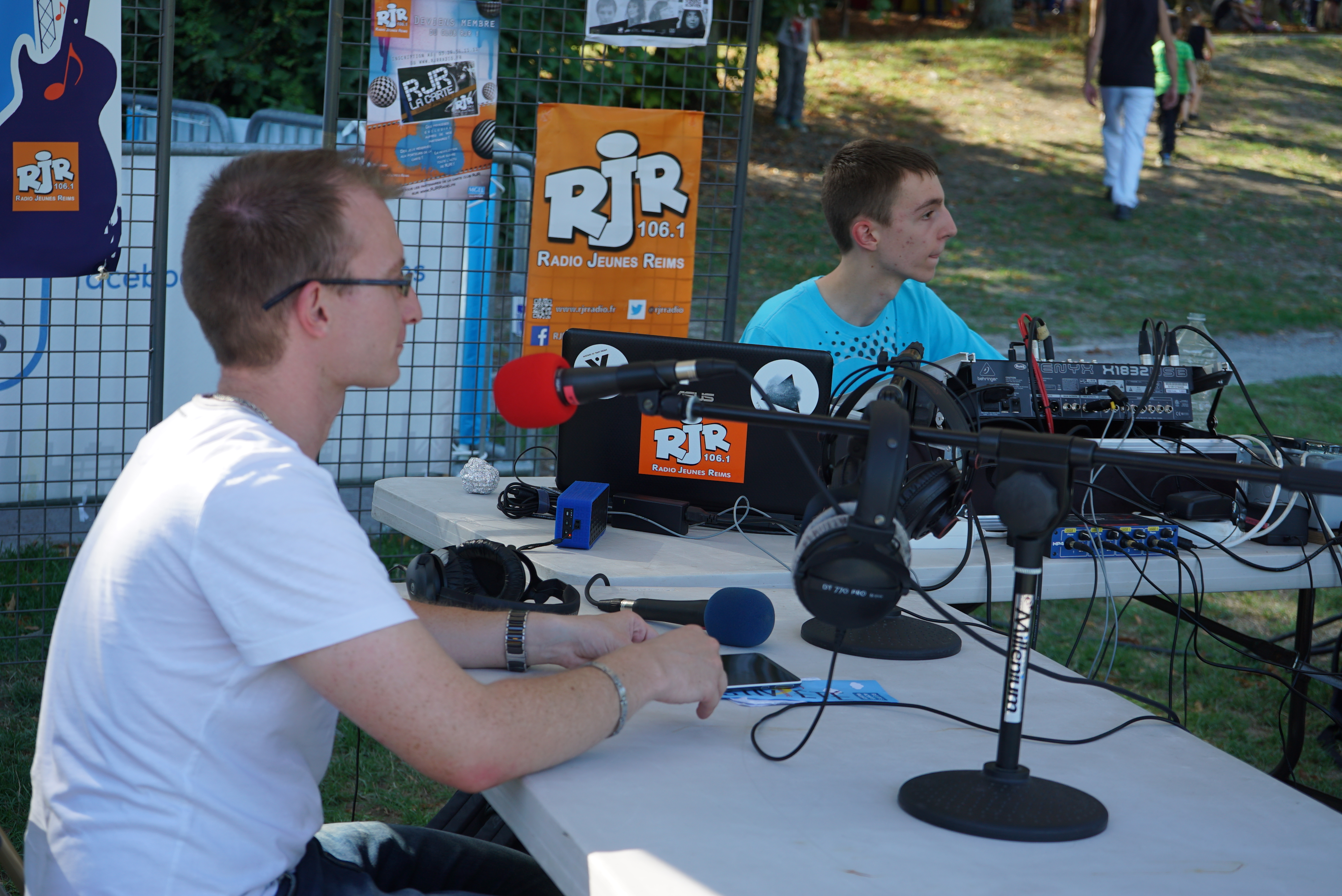 un direct de RJR lors de Reims Vital été 2015.